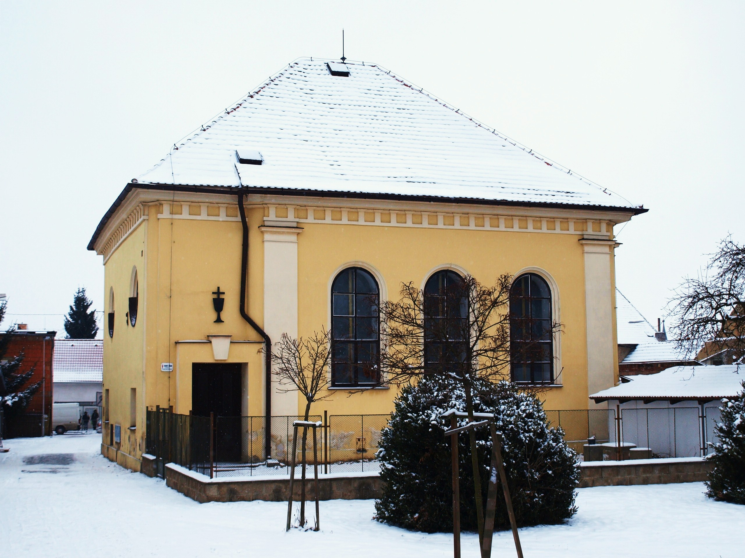 Někdejší synagoga, dnes modlitebna ČS církve husitské, Nové Strašecí